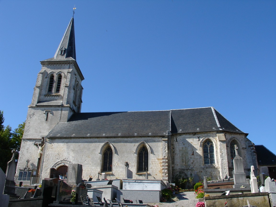 Église de Coulomby